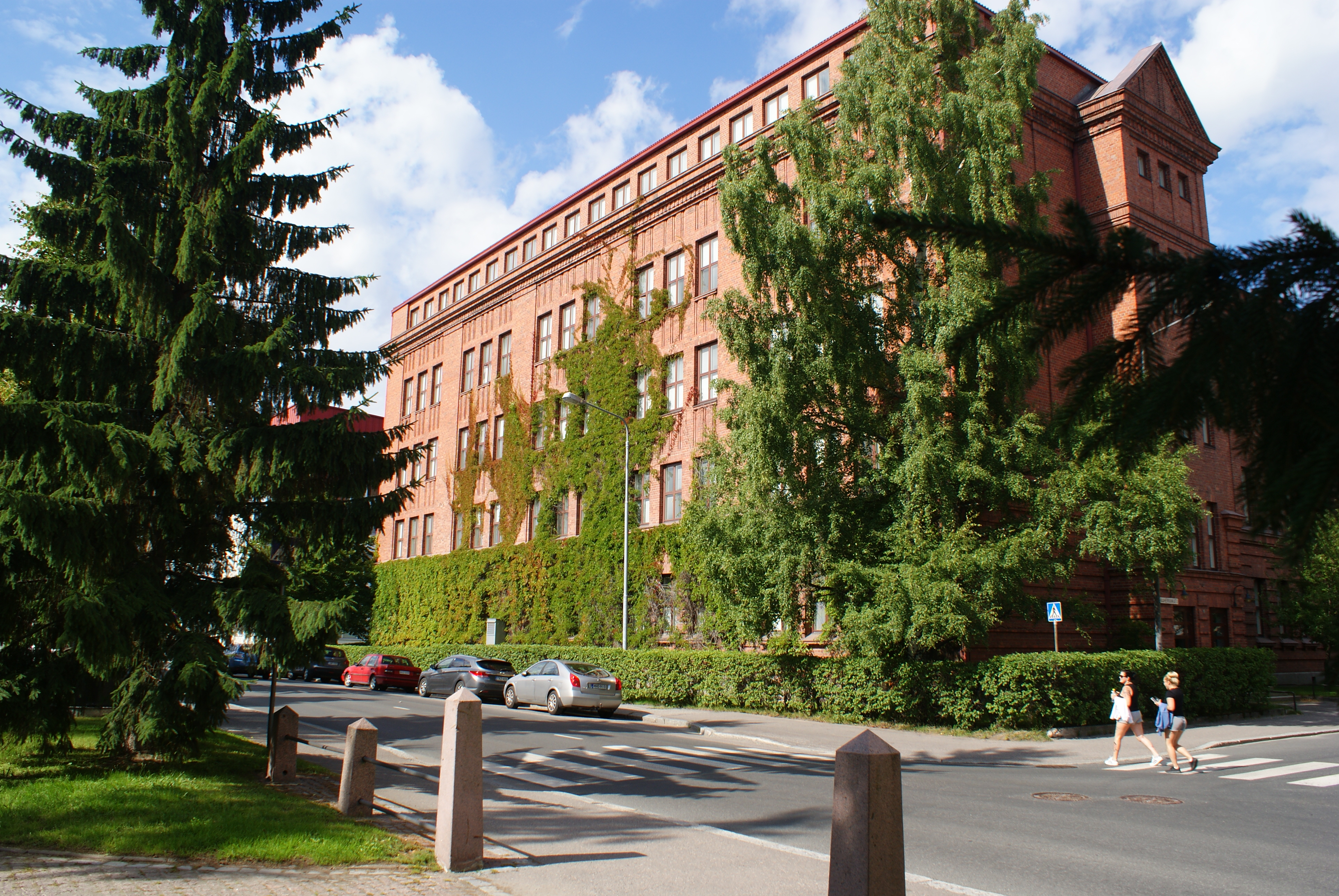 Kallaveden lukio